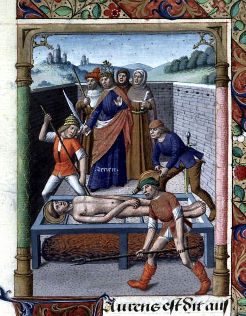 Saint-Laurent sur le gril. Enluminure d'un ouvrage du XVe siècle (Jacobus de Voragine, "Legenda aurea"). Libre de droit.